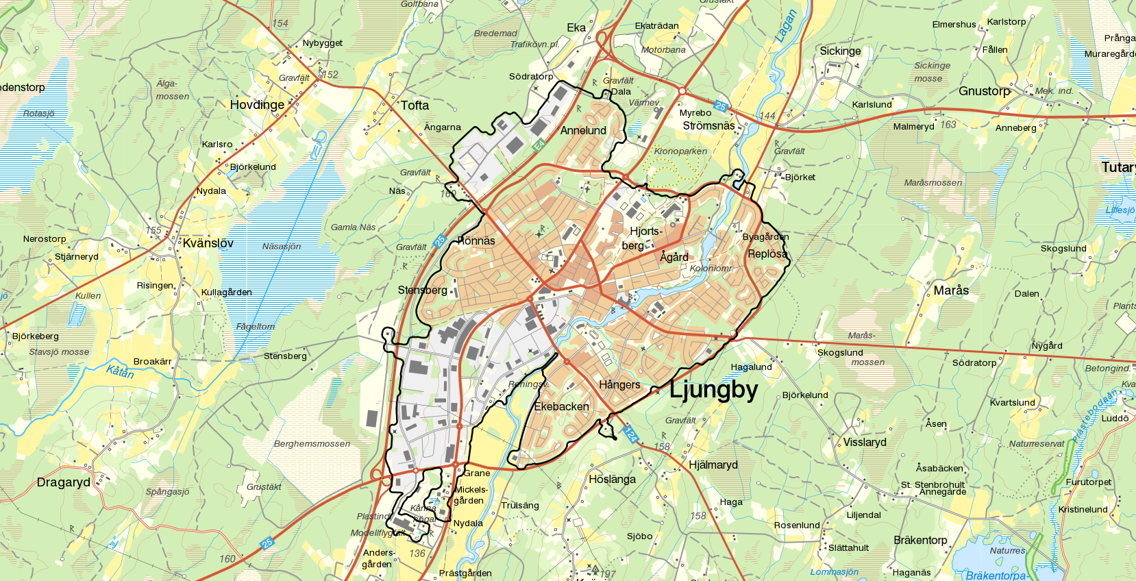 Tätorten Ljungby med gränserna från Statistiska centralbyråns tätortsavgränsning 2015 i svart. Bakgrundskarta från Lantmäteriet, skala 1:30 236.